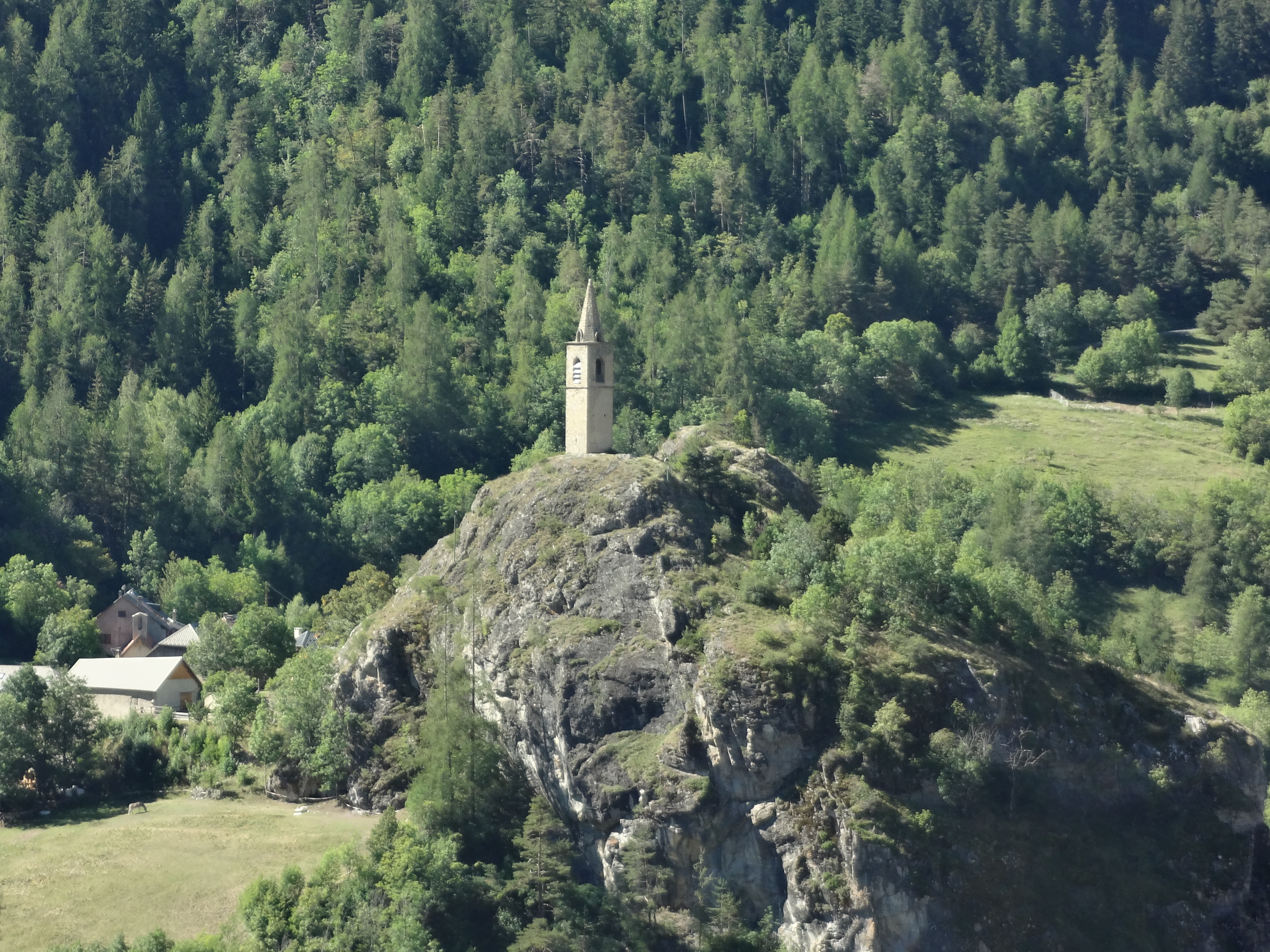 Clocher de l'église Saint-Julien de Méolans (disparue), commune de Méolans-Revel, Alpes-de-Haute-Provence